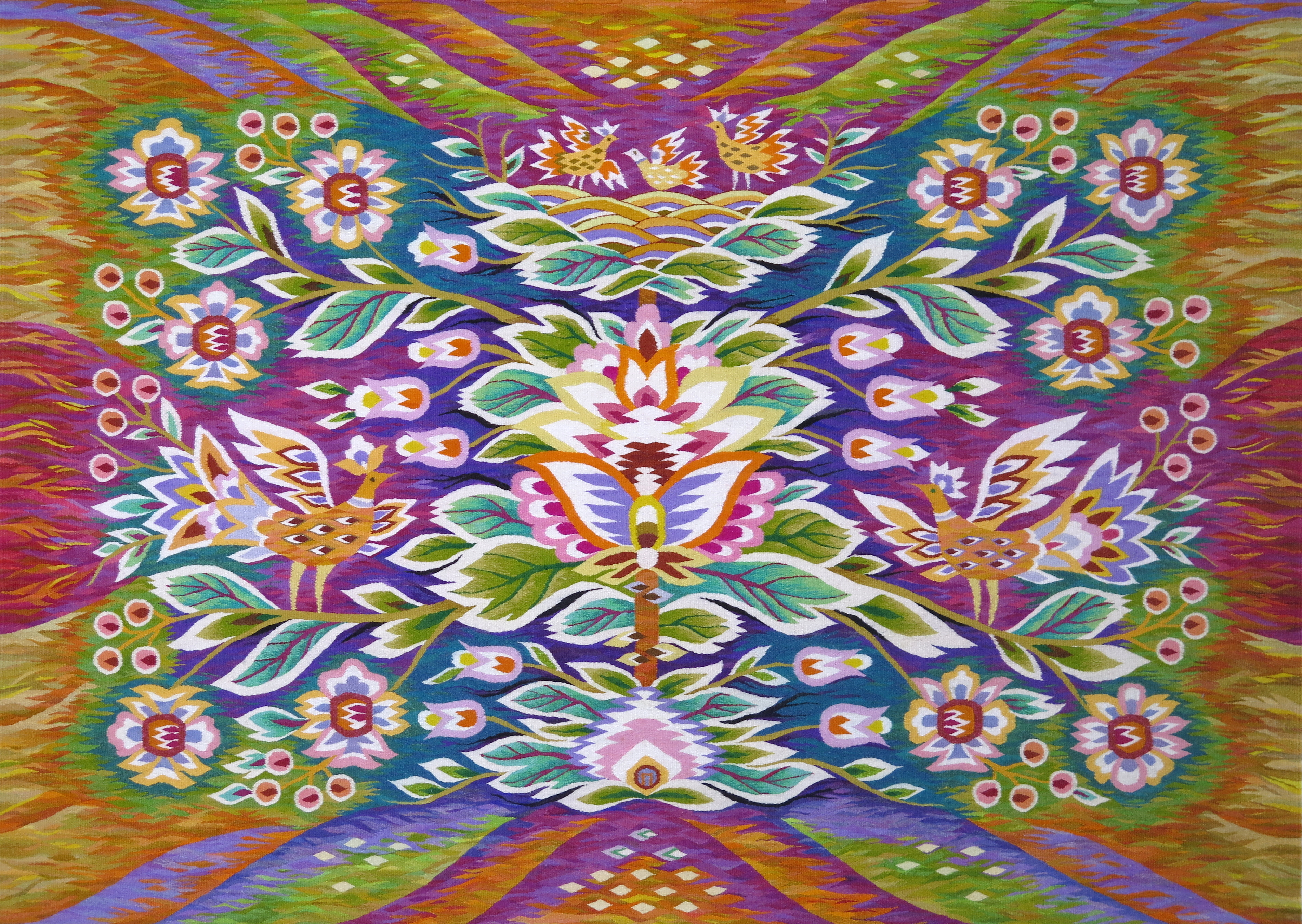 Авторський гобелен Ольги Пілюгіної "Квітуча родина", 2019р., 147х199 см